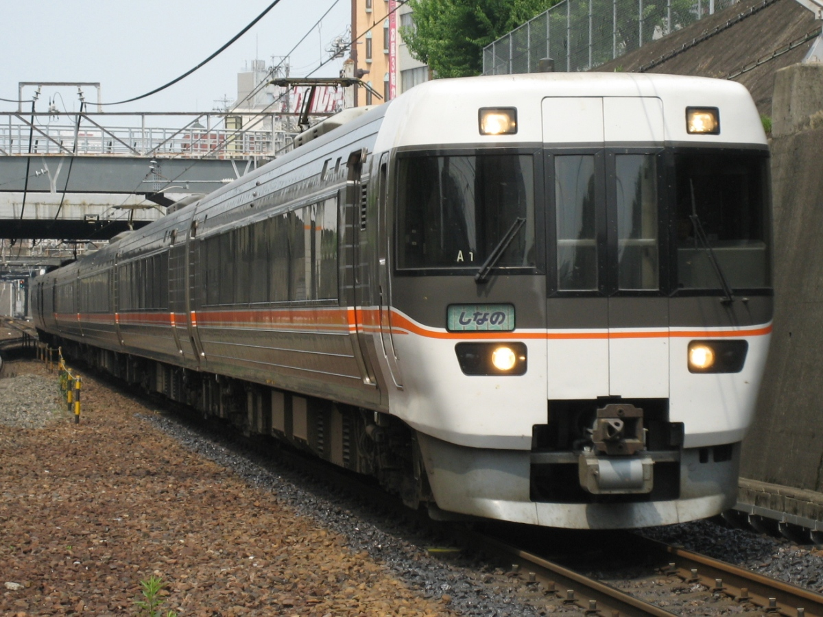 2005年5月25日に千種駅で継之助が撮影。383系特急しなの、名古屋方面の貫通型先頭車。